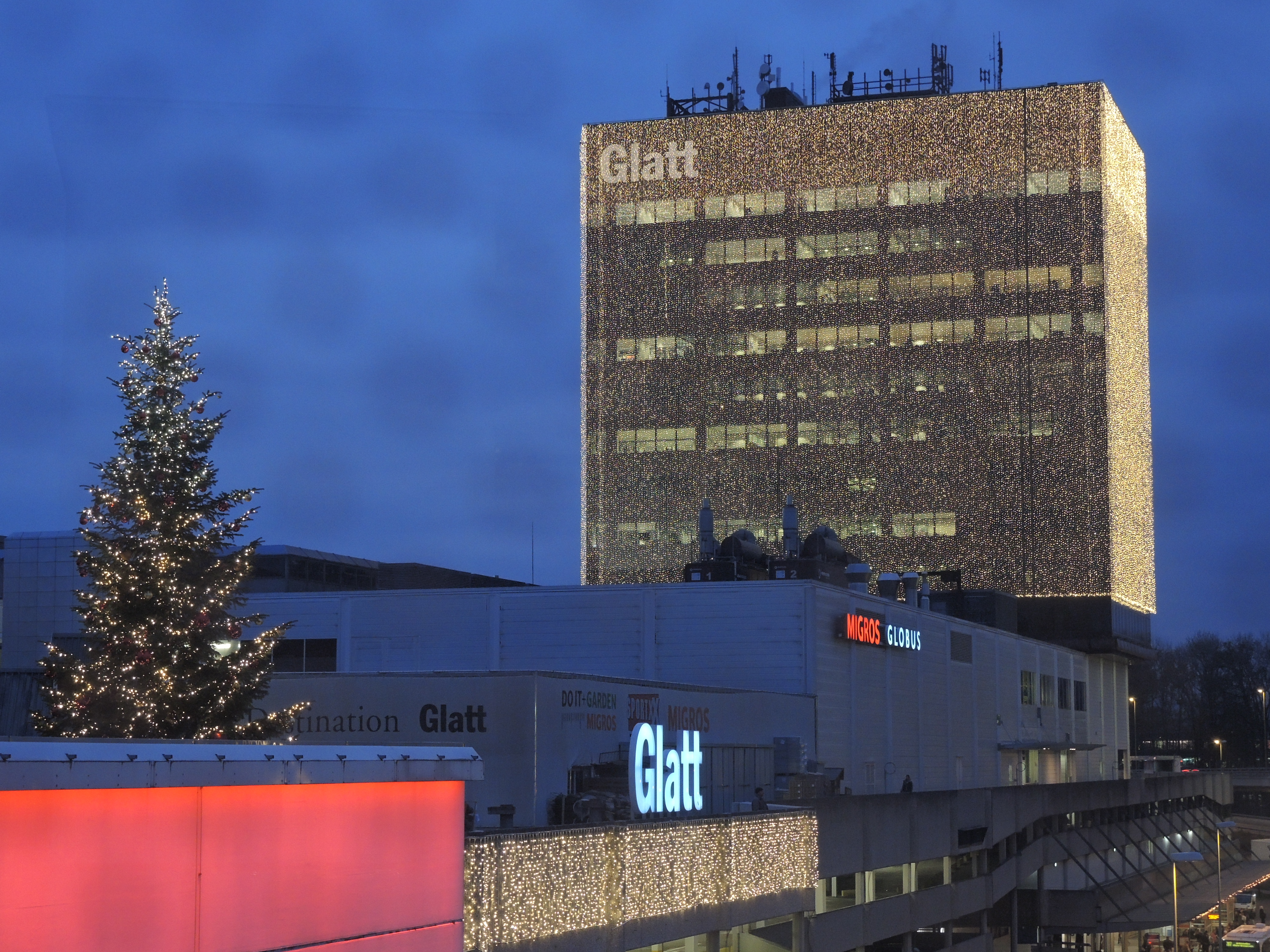 Glattzentrum in Wallisellen (Switzerland)